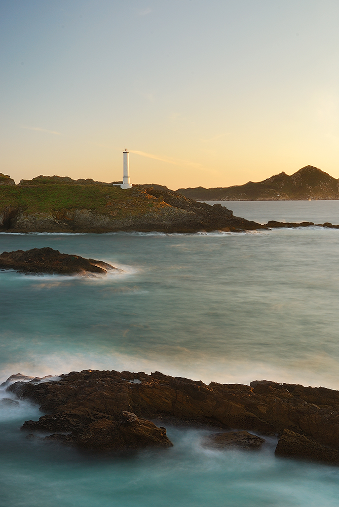 Cabo do home, Cangas, Galiza